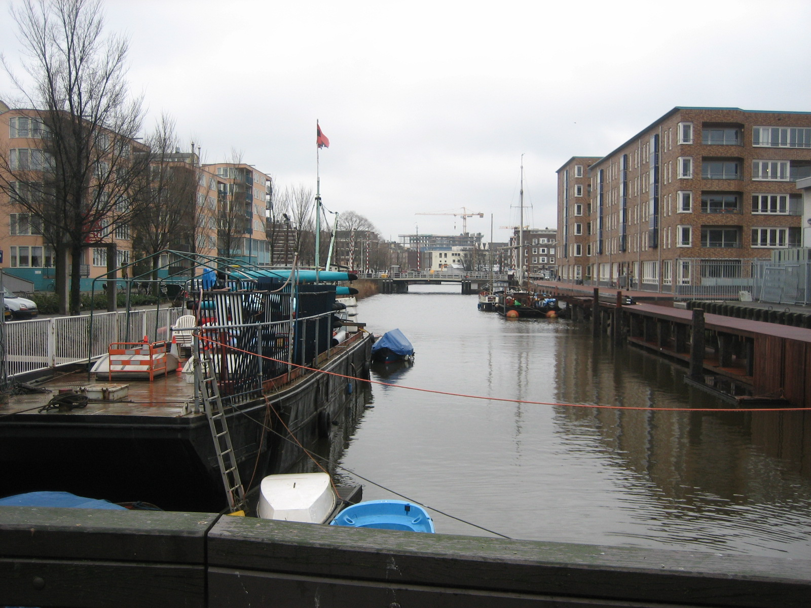 Van Noordtgracht in Amsterdam, met links het huizenblok van Theo Bosch. Foto genomen vanaf brug 1910; in de verte is brug 345, de Yszeebrug, te zien